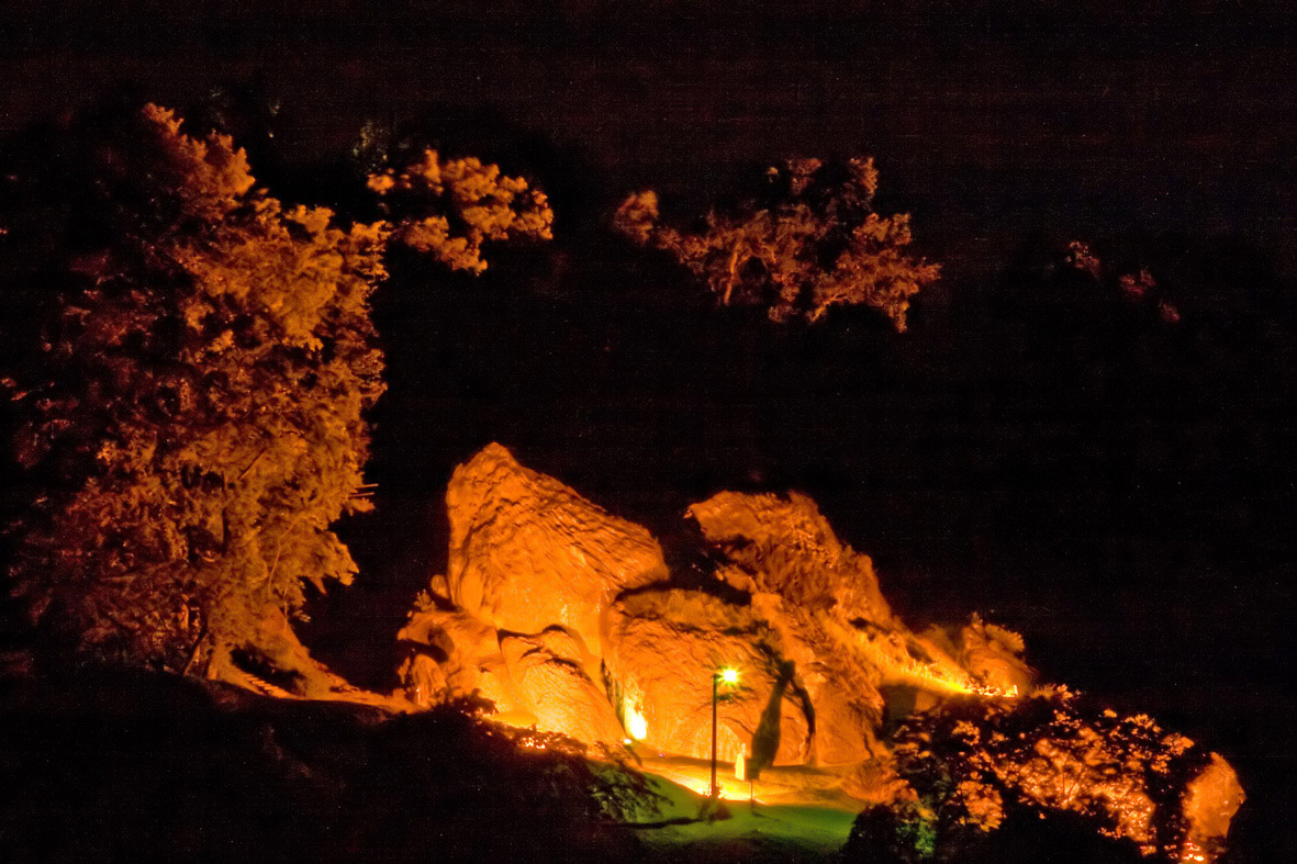 Der Wilde Stein in Büdingen, Deutschland Der „Wilde Stein“ ist ein auffälliges und seltenes aus Säulenbasalt bestehendes Geotop. Es entstand als Nebenschlot des Vogelsbergvulkans.